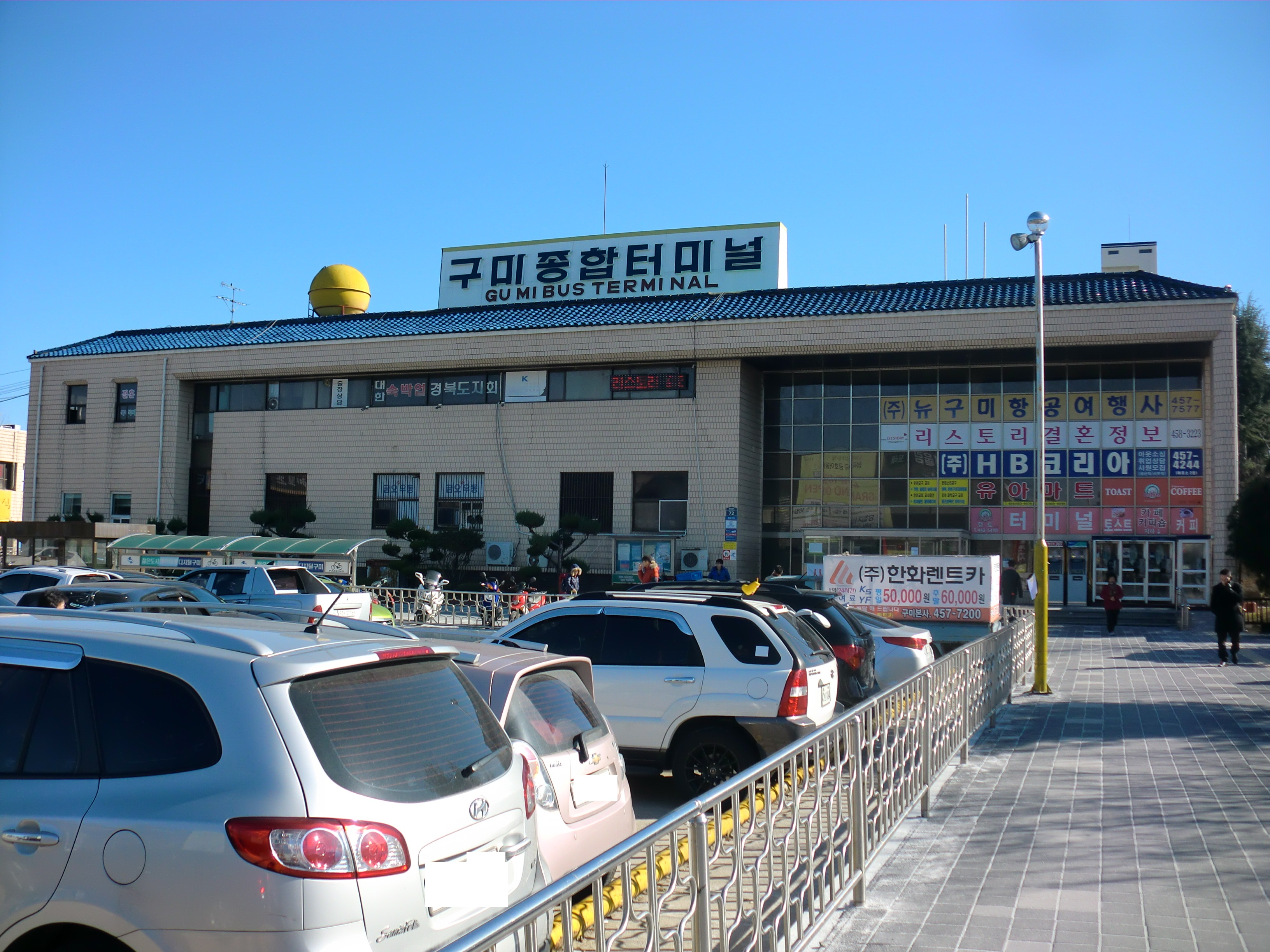 경상북도 구미시에 있는 구미버스터미널